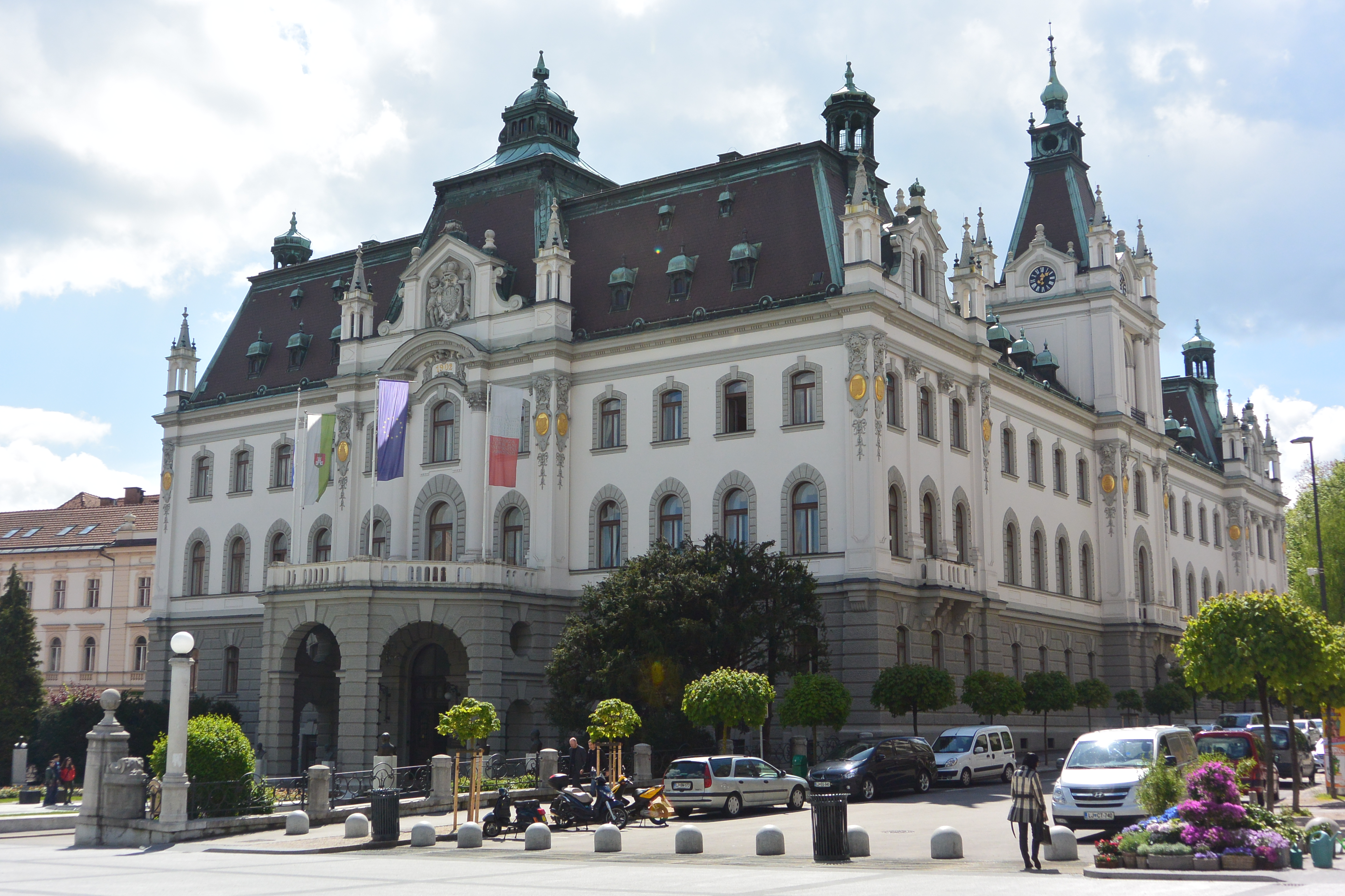 Laibach